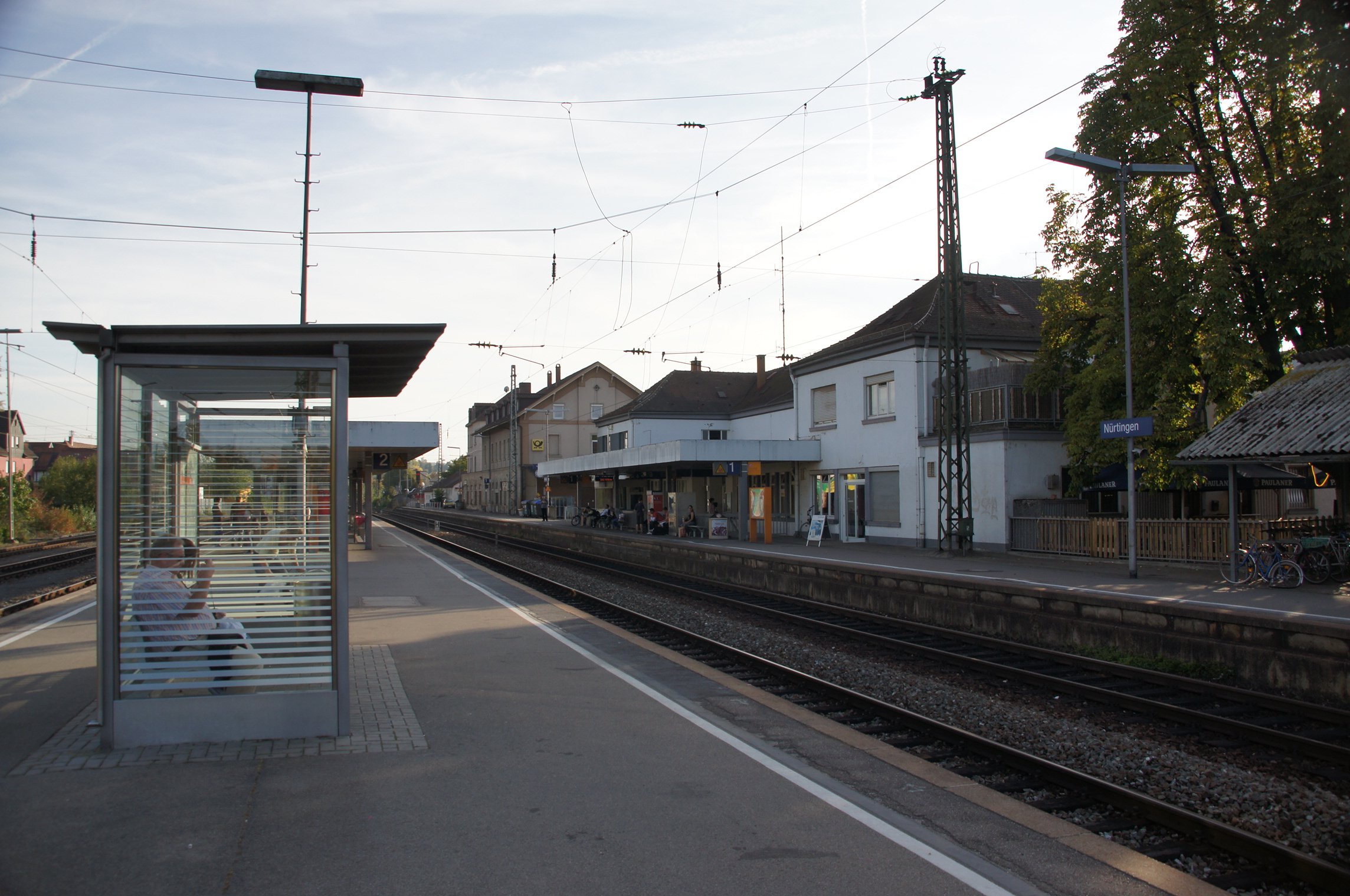 Bahnhof Nürtingen